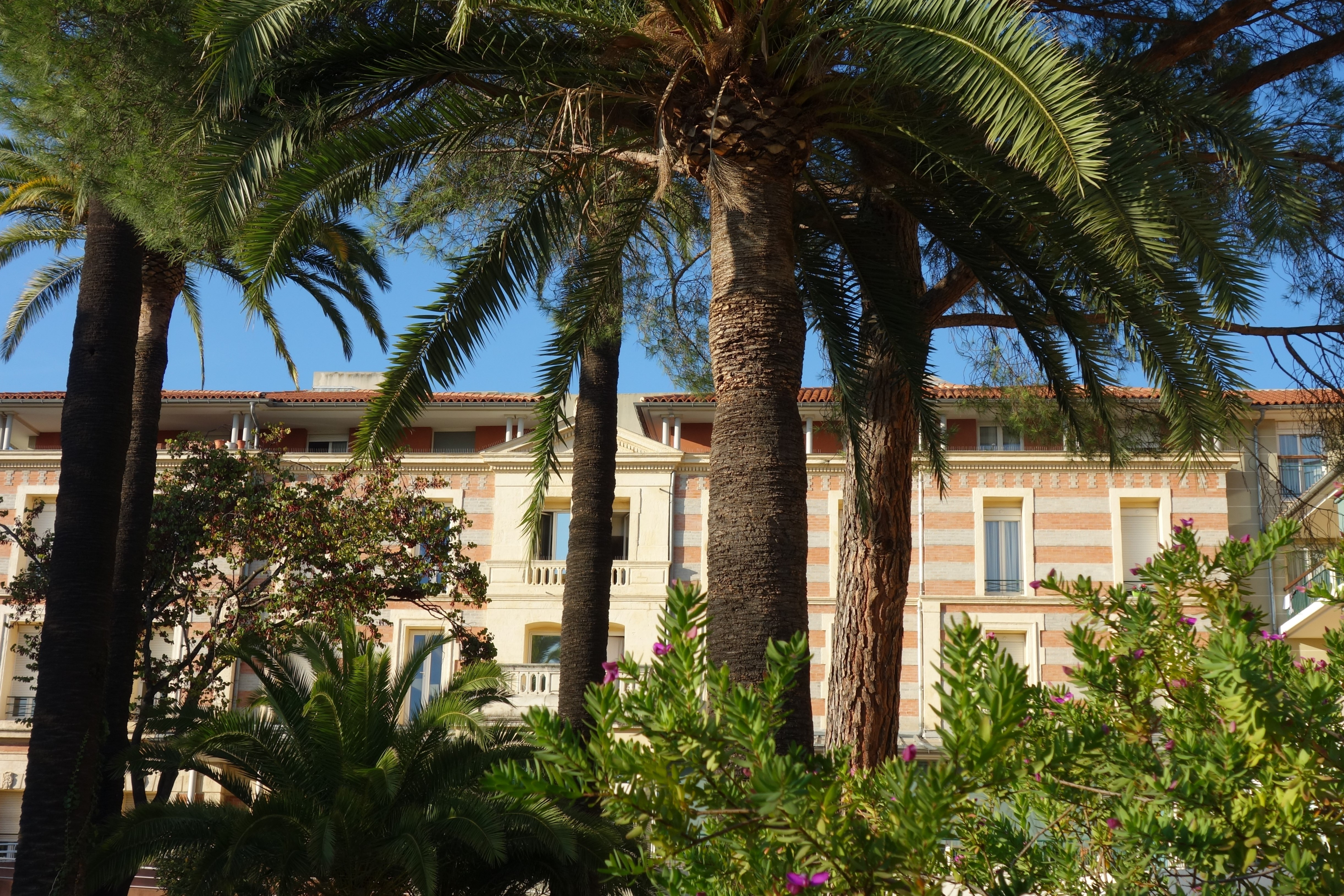 Centre de Gériatrie Beausejour, früher Grand Hotel Beause Joure und Altersruhesitz Georgij Iwanow in Hyeres, 1 Avenue du Quinzieme Corps, Bild 2016